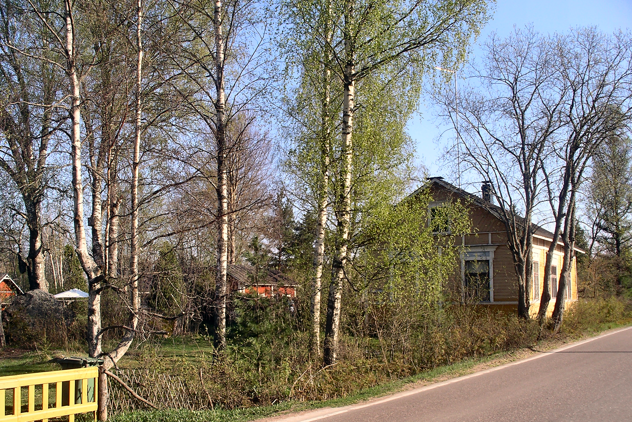 En gård i Svartbäck Pyttis (Pyhtää)